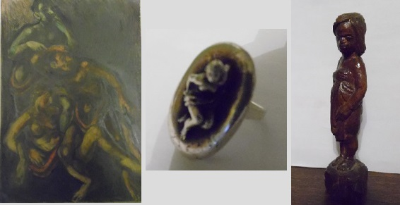 prace autorstwa Aleksandra Kruszewskiego